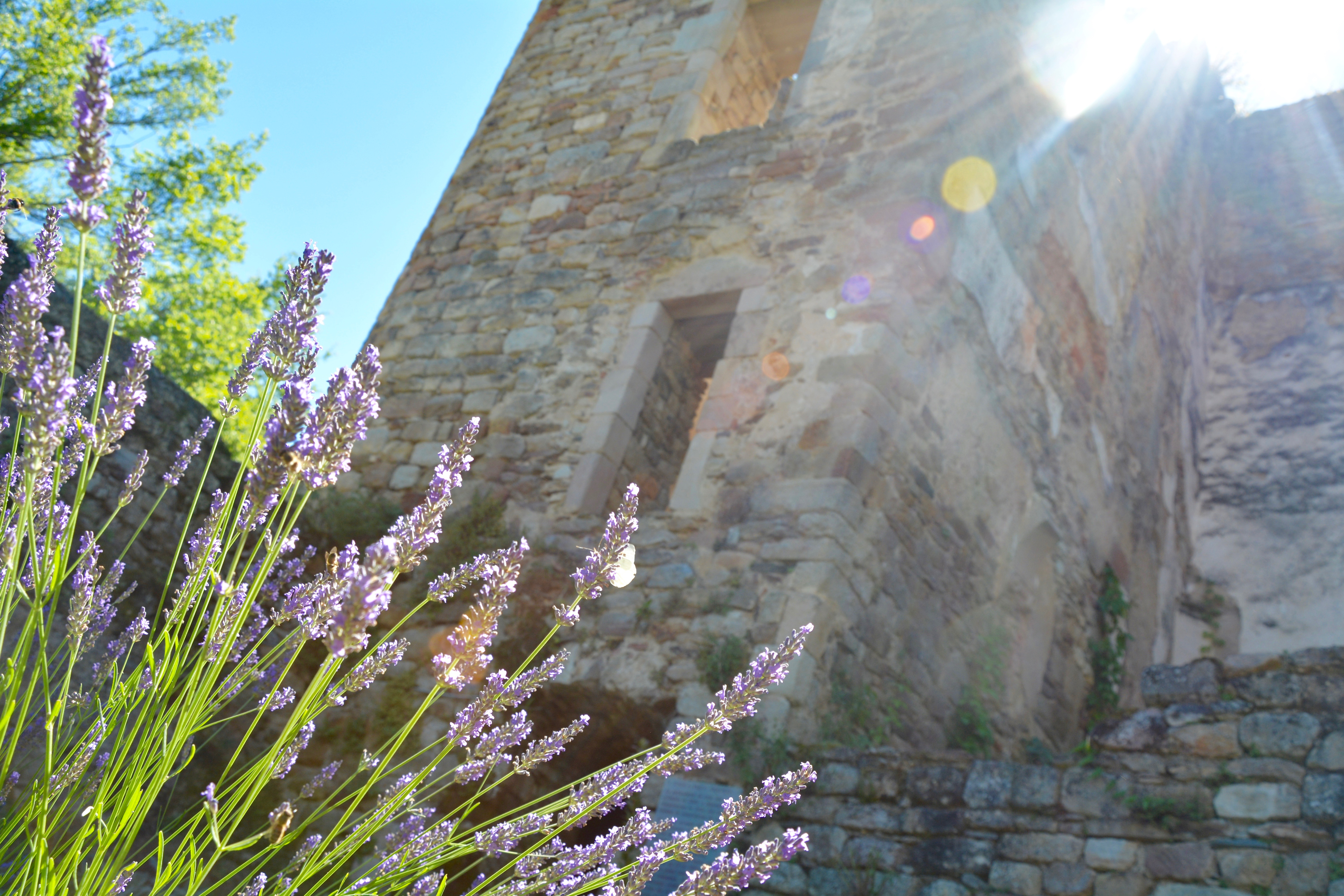 Tour a angles arrondis chateau de saint Martin Laguépie